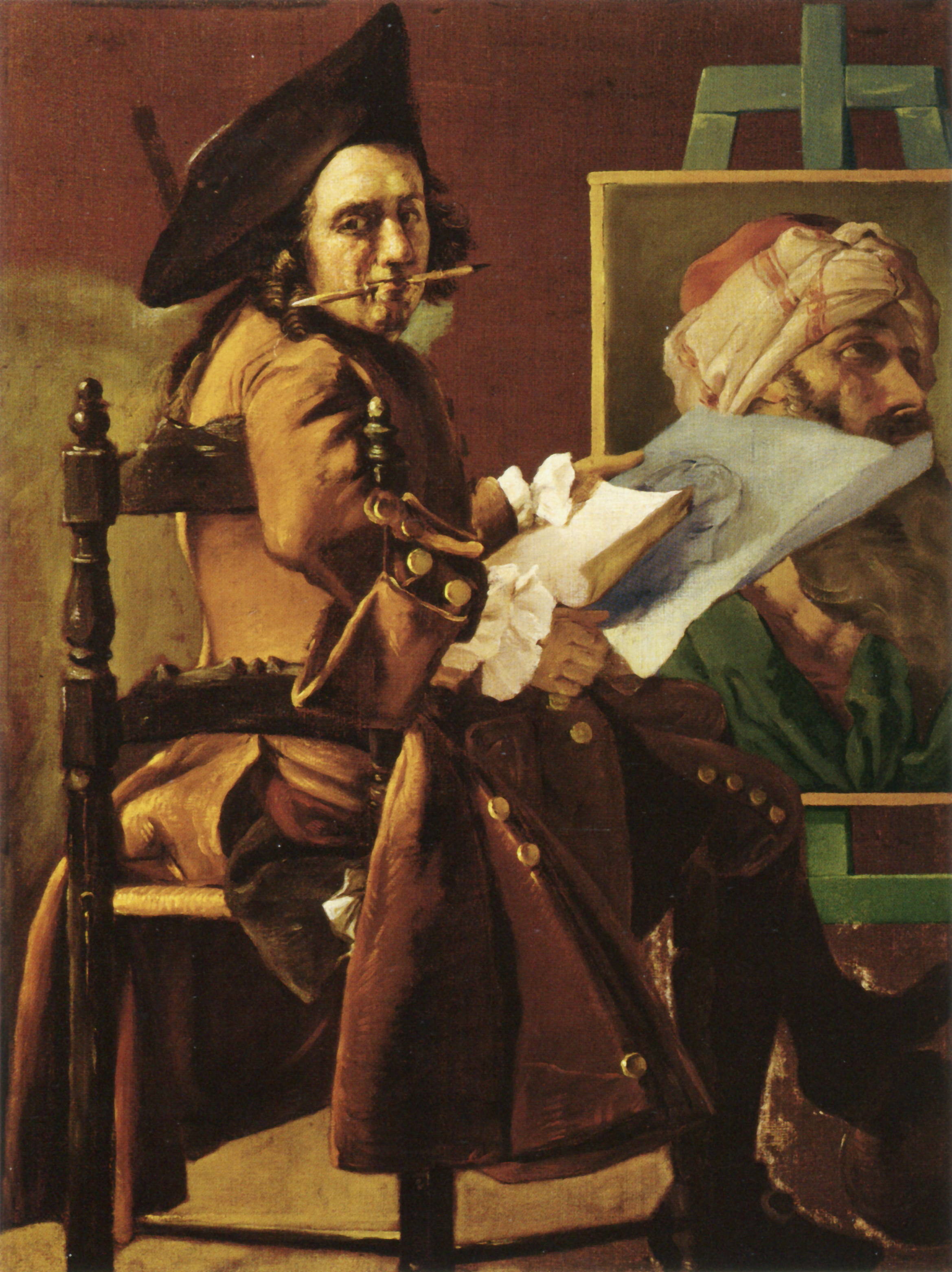 Self-portrait